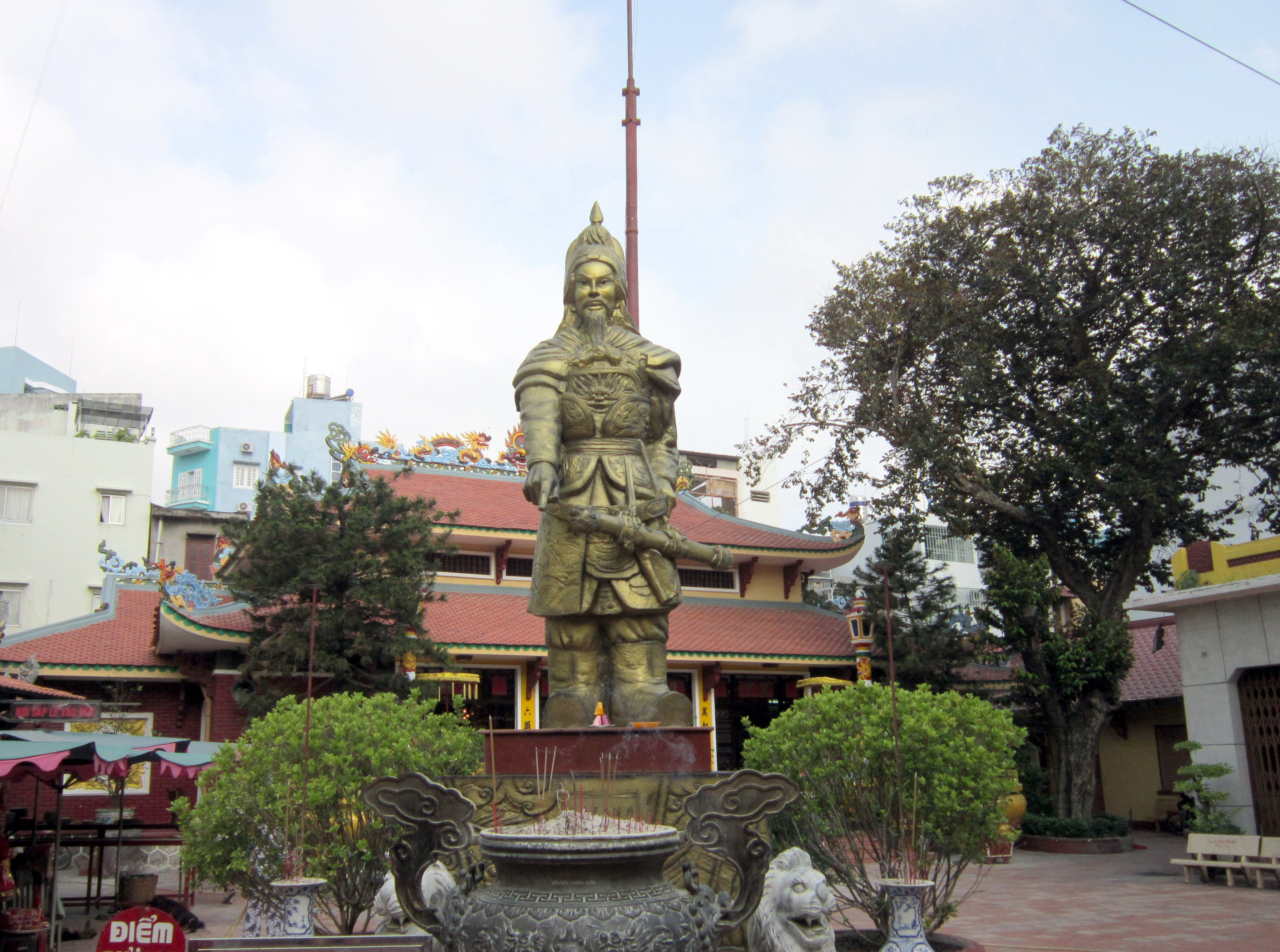 Tượng Trần Hưng Đạo ở sân đền thờ ông ở số 36 đường Võ Thị Sáu, thuộc phường Tân Định, quận 1, Thành phố Hồ Chí Minh, Việt Nam.